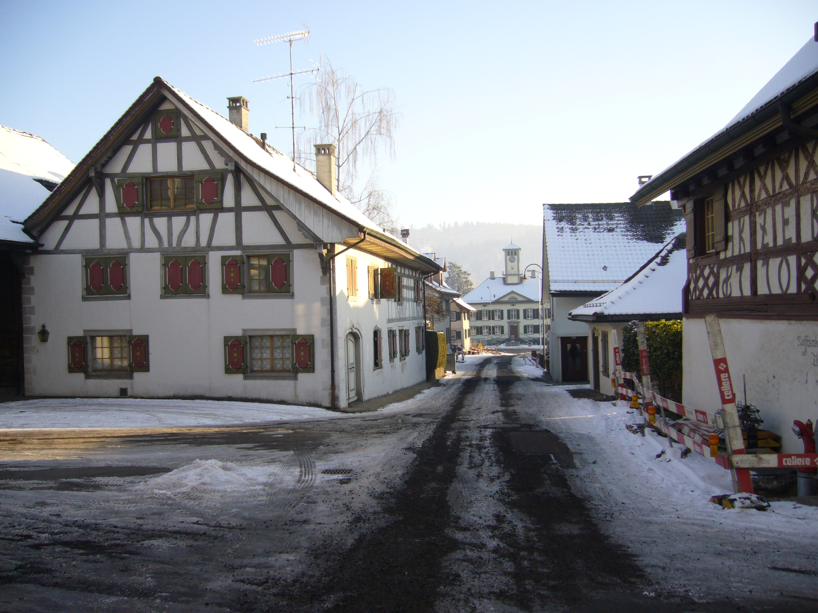 Blick von der Dorfmitte die Kirchbergstraße hinab zur Gmeindkanzlei.